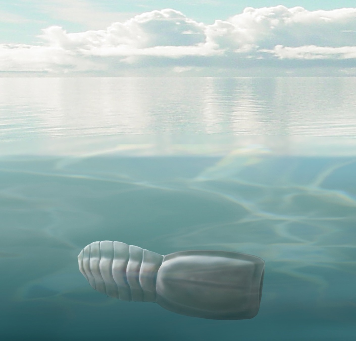 The early Cambrian vetulicolian Nesonektris aldridgei. A–C, Holotype SAM P45212a,b, specimen with distal end of posterior body region (S4–S7) folded over itself, anterior towards left; A, part, anterior rim exposed by preparation (arrow points to cuticle wall under the rod); B, Counterpart, with severed notochord (detail in Figure 2B); C, camera lucida drawing, grey indicates sediment infill; D, SAM P49084a, nearly complete specimen, only lacking one side of anterior region body; E, SAM P48073a, nearly complete specimen; F, SAM P48015a, nearly complete but folded specimen; showing fold on anterior region (oblique arrow) and continuous connection between anterior and posterior body regions along the dorsal margin (vertical arrow); G, Reconstruction; abbreviations: dk = dorsal keel; eb = epibionts; ism = intersegmental membrane; lg = lateral groove; nc = notochord; om = oral margin; vk = ventral keel; S1–S7 = posterior body region segment number; scale bars, 5 mm.